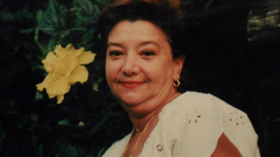 En mis telenovelas.